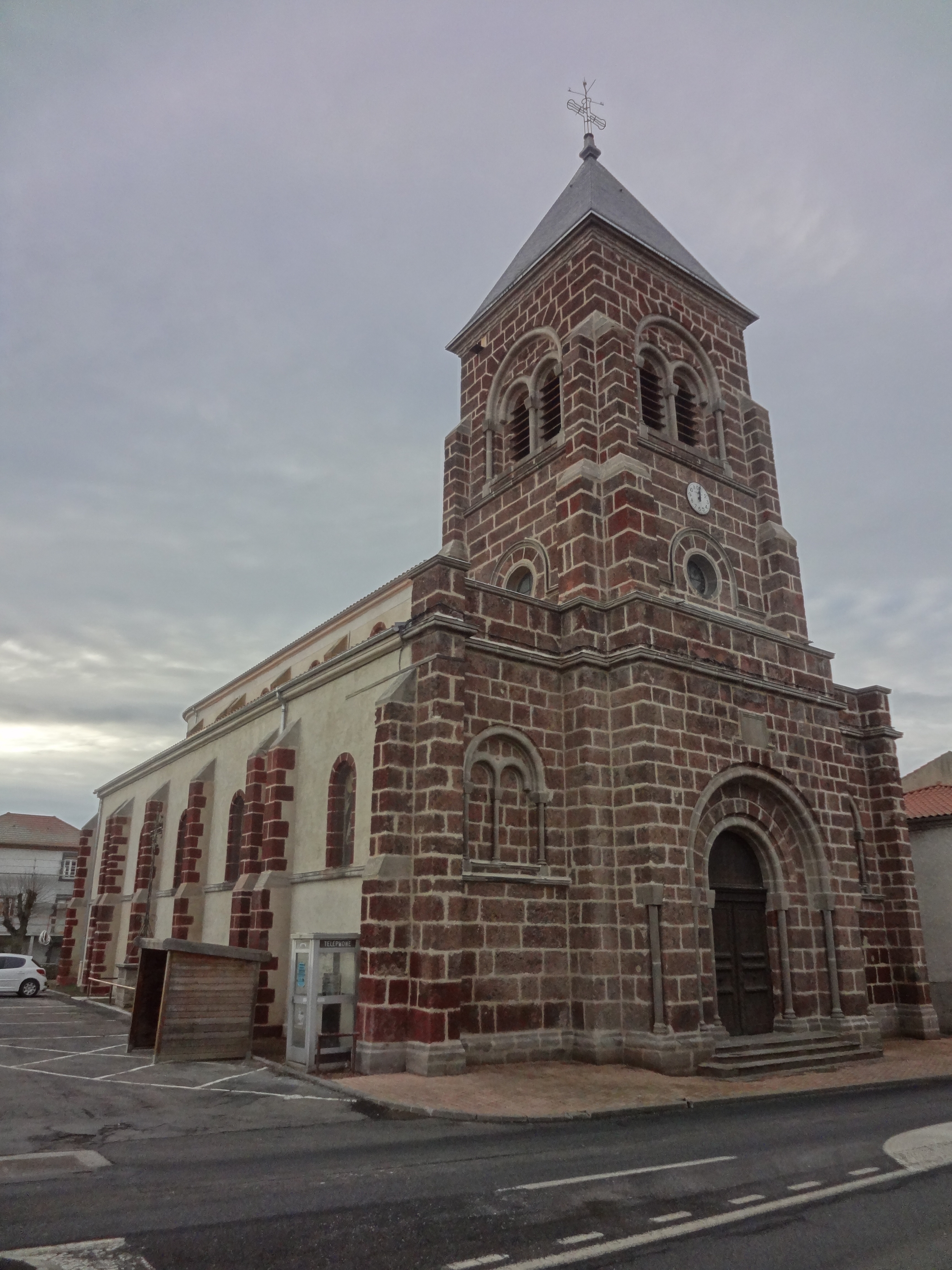 Façade principale de l'église Saint-Georges à Saint-Georges-d'Aurac (43).